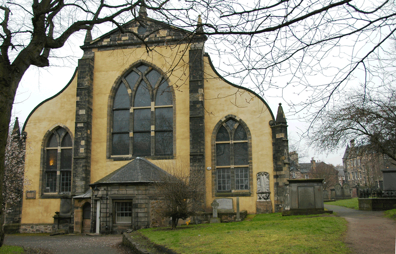 Parroquia de la pre-Reforma Escocesa de Fraile Grey